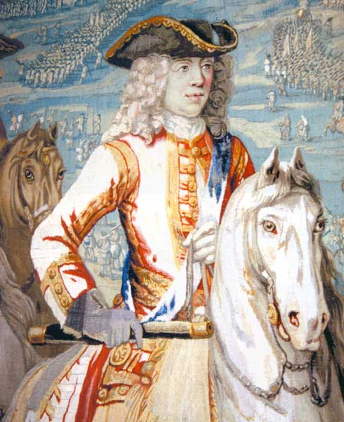 Lambert de Hondt (Karton) und Judocus de Vos (Bildwirker): John Churchill in der Schlacht bei Oudenaarde (11. Juli 1708), Brüsseler Bildwirkerei, 18. Jh, Blenheim Palace, England [1]